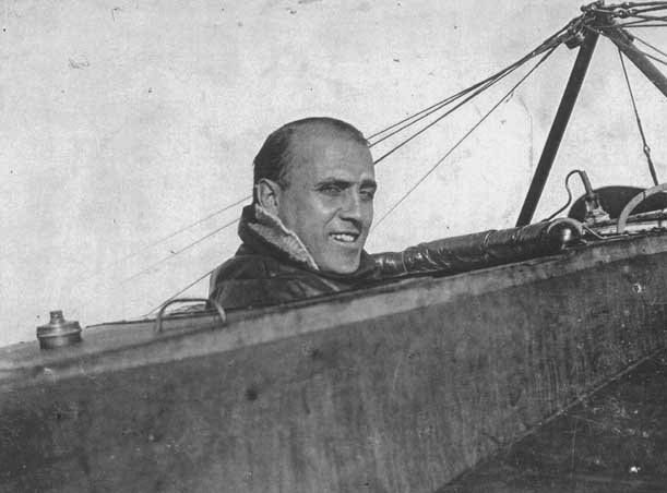 Jorge Newbery en su avión